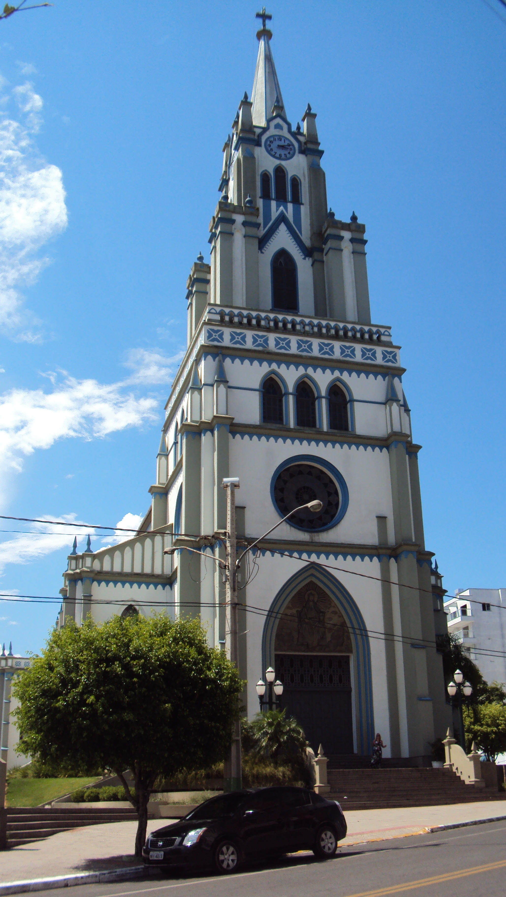 Igreja Matriz de Orleans, 9 de fevereiro de 2014.